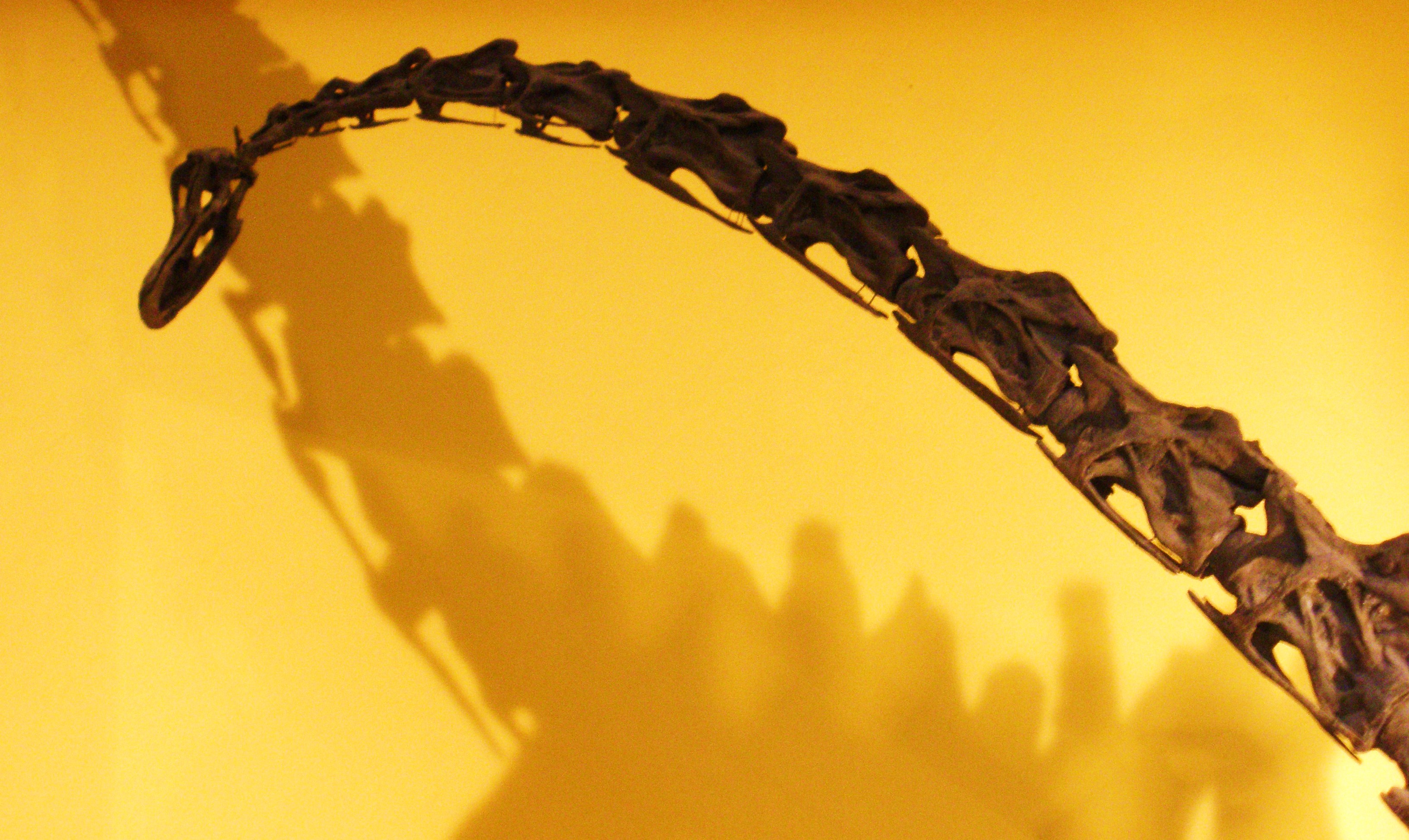 fossil Kaatedocus